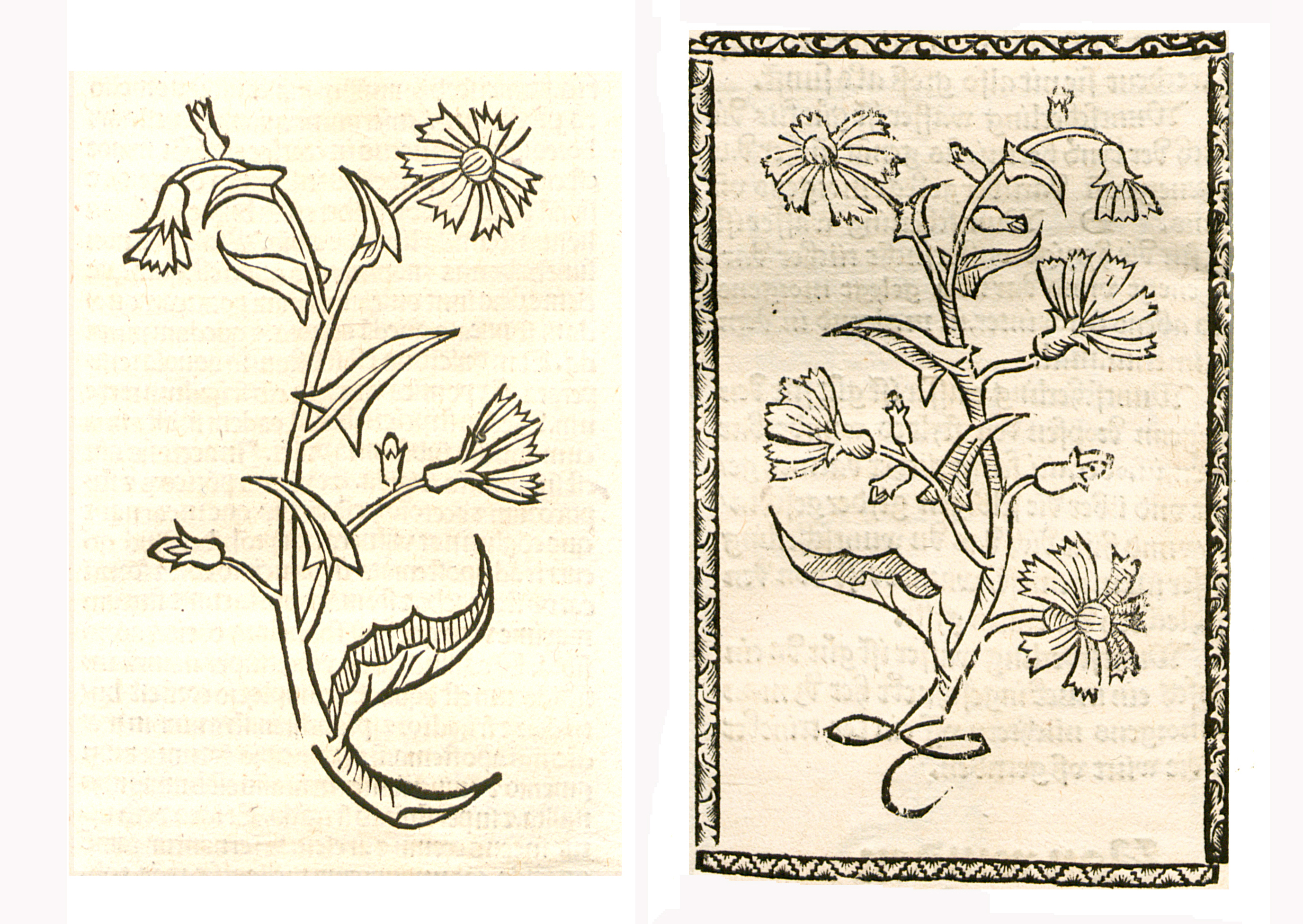 Abbildung von Wegwyß (Cichorium intybus)